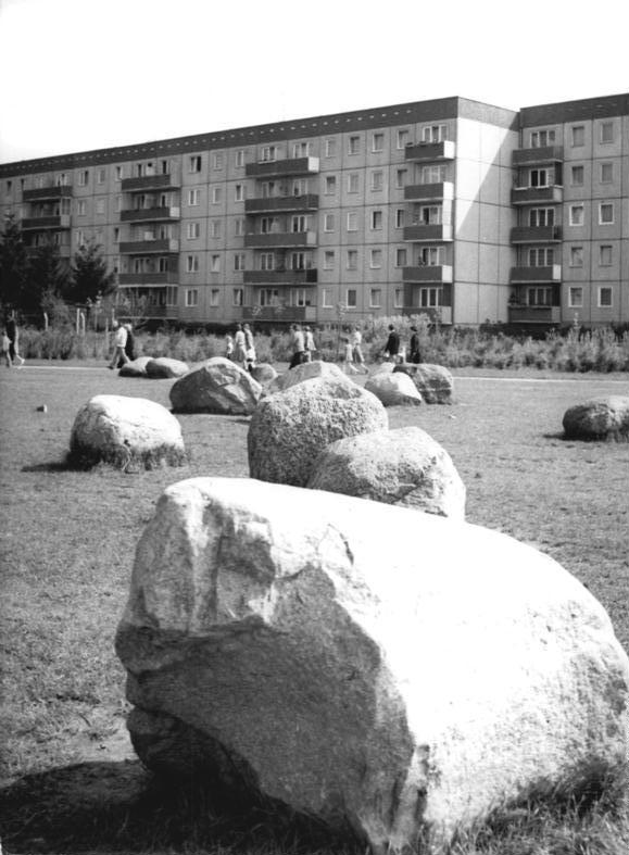 Neubrandenburg, Findlinge ADN-ZB Bartocha 27.5.1977 Zum Beitrag: Durch alle vier Tore in ein neues Wohngebiet- Viele Neubrandenburger Zukunfsvisionen schon Wirklichkeit. Findlinge als Zeugen der Eiszeit, an denen die mecklenburgische Landschaft so reich ist, im neuen Stadtteil Neubrandenburg-Ost. Nach Beratungen mit den Bauleuten wurde in Neubrandenburg klargestellt, daß Findlinge, die größer als ein Kubikmeter sind, nicht mehr vergraben werden dürfen. Sie sollen liegen bleigen - vielleicht zum Klettern für die Kinder, zum Ausruhen oder auch als Landschaftssymbol, vielleicht auch aus allen Gründen zusanmmengenommen. (Bitte beachten Sie hierzu auch S0527-304-305N + 307N)